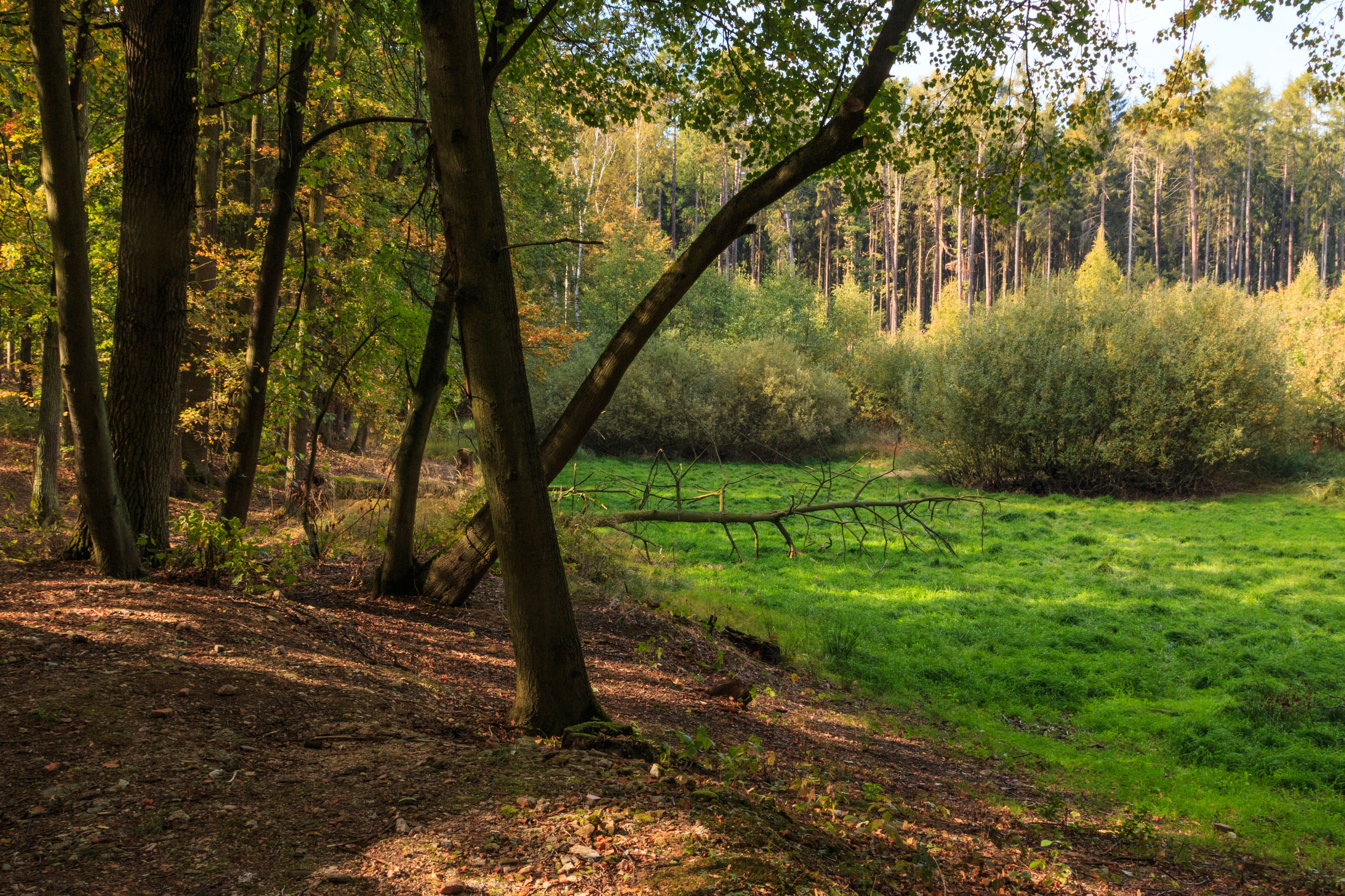 Rybníček Pod Jehlickým vrchem Project: Vodstvo.